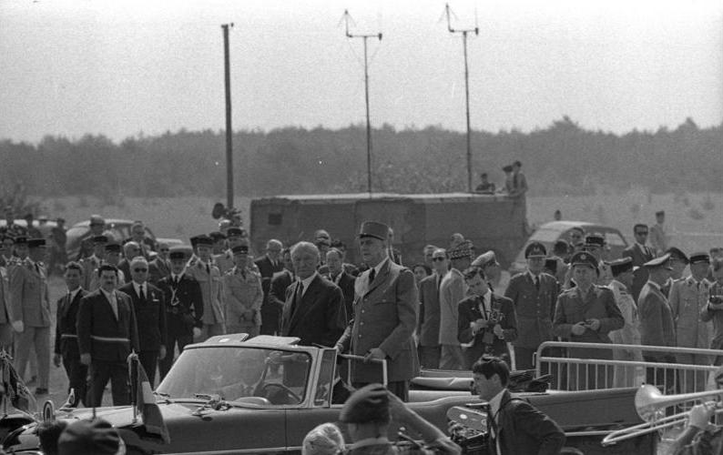 Reims / Frankreich Reise von Bundeskanzler Konrad Adenauer nach Frankreich Militärparade in Mourmelon bei Reims in Anwesenheit von Staatspräsident Charles de Gaulle.